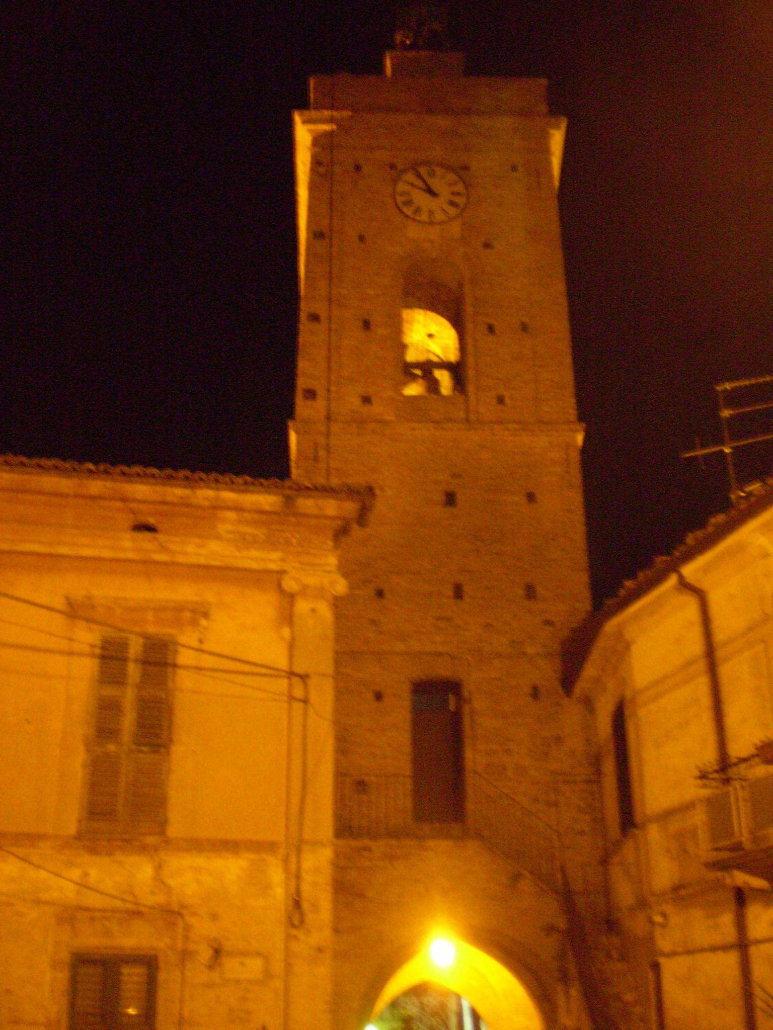 Il campanile della chiesa principale del paesino abruzzese di Paglieta